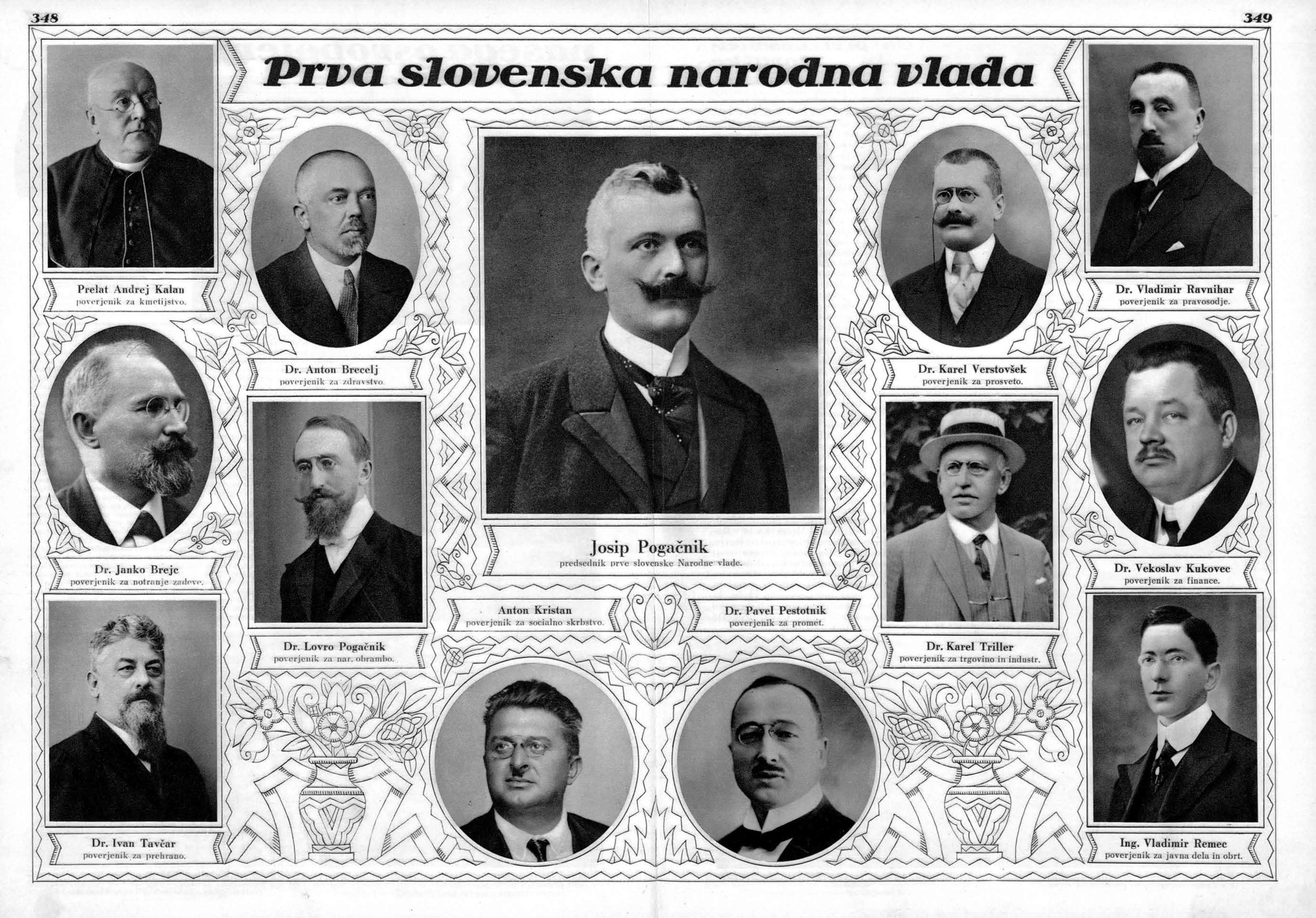 Prva slovenska nardona vlada.